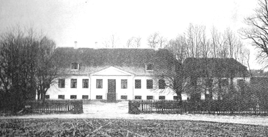 Nielstrup er oprindelig en landsbyhovedgård, der i tidens løb har opslugt de andre gårde i byen, gården nævnes første gang i 1325. Gården var en avlsgård under Baroniet Lehn / Hvidkilde Gods fra 1749 til 1980. Nielstrup ligger i Ollerup Sogn, Sunds Herred, Egebjerg Kommune. Hovedbygningen er opført i 1820.